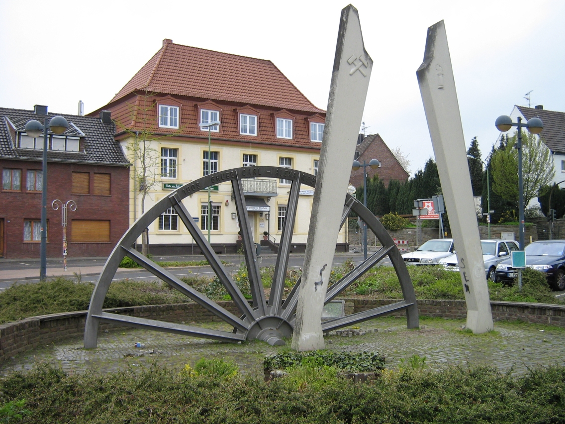 Denkmal für die Kohlegrube Carl-Alexander in Baesweiler, am Reyplatz